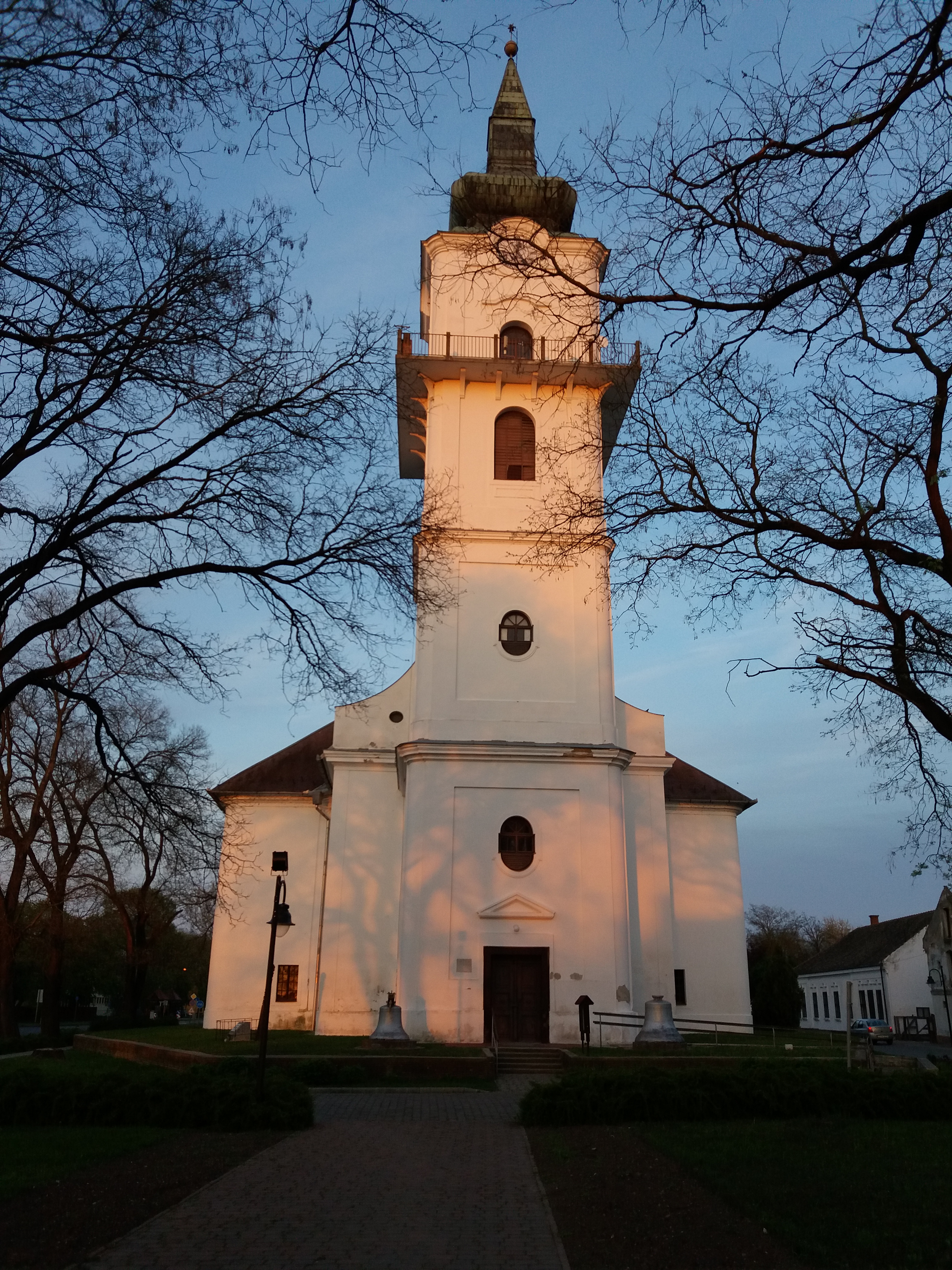 A református templom Szeghalomnál, Békés megyében.